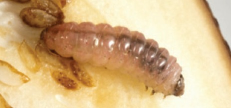 Leucinodes laisalis